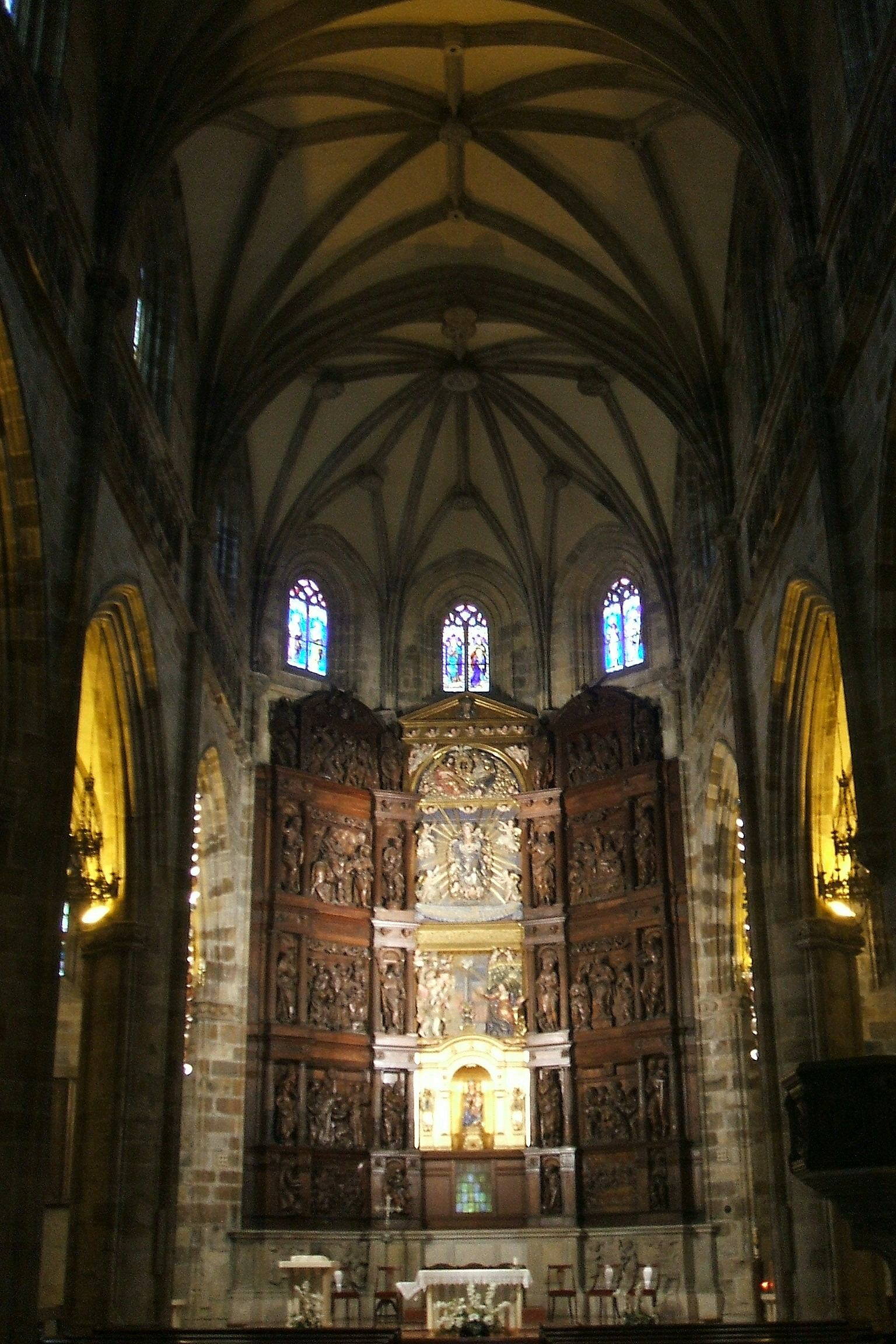 Nave central y capilla mayor de la Basílica de Santa María, Portugalete, Vizcaya, País Vasco, España